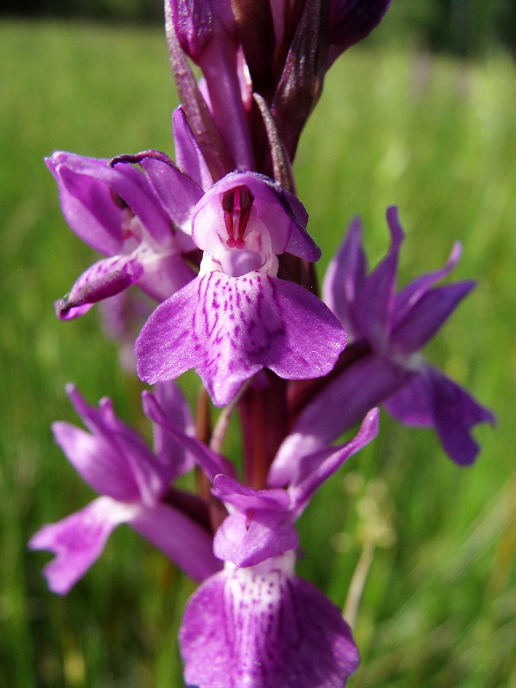 Dactylorhiza elata, Bardenat, Dordogne (France)